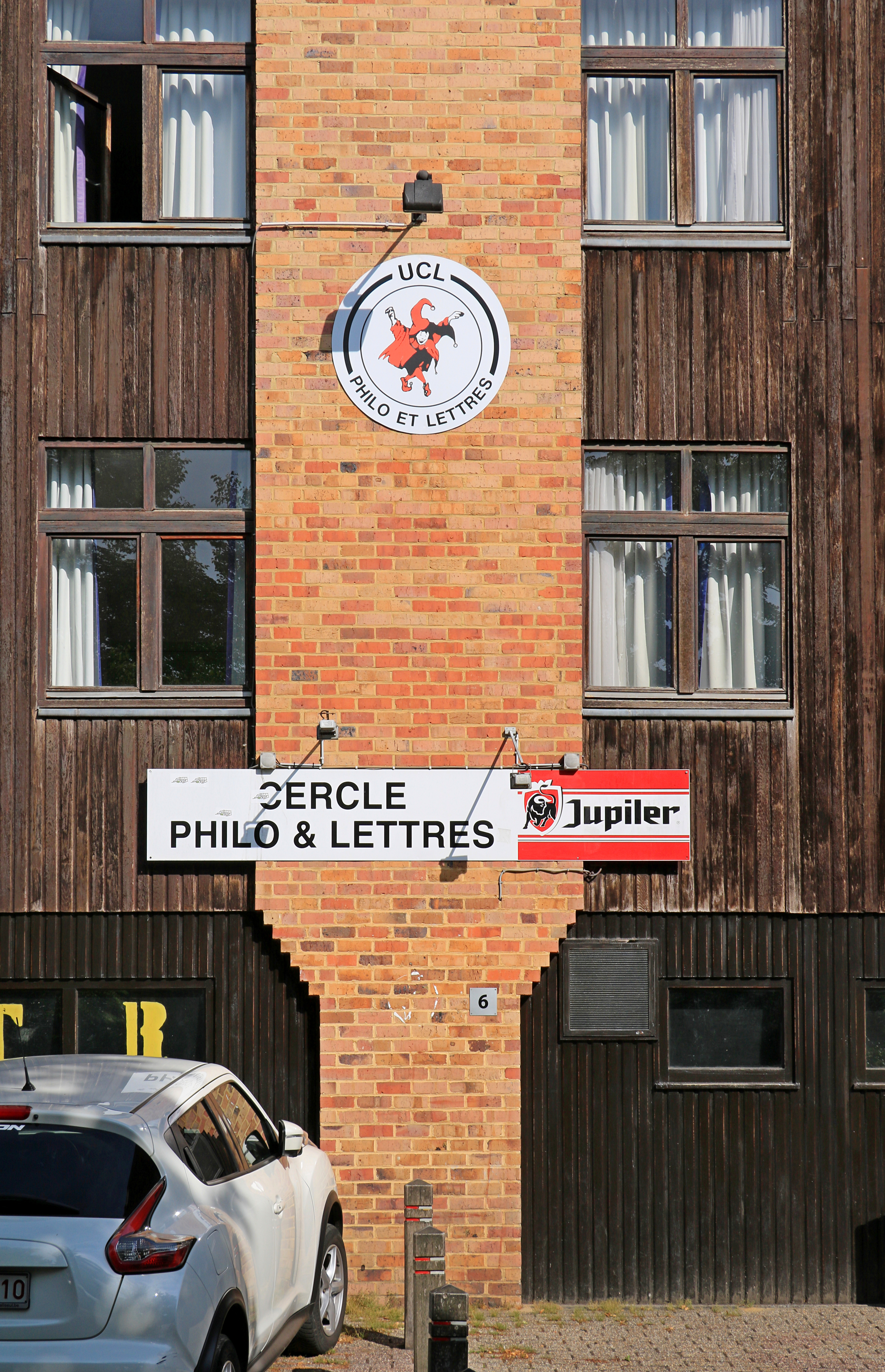 Belgique - Louvain-la-Neuve - Cercle de Philo et Lettres (voie Cardijn 6)